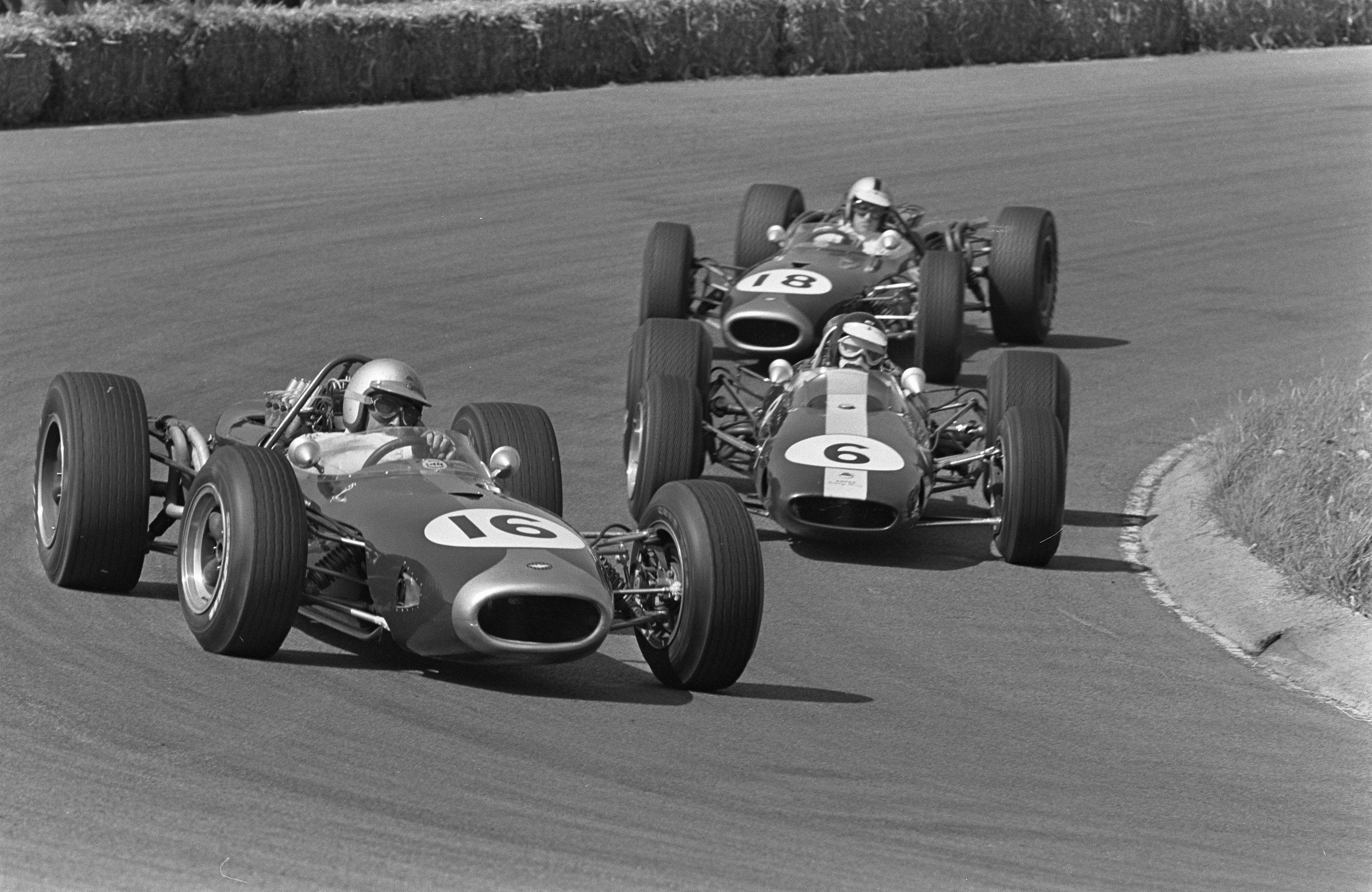 Grand Prix te Zandvoort, wagens tijdens de race. Jack Brabham (16) aan de leiding, gevolgd door Jim Clark (6) en Denny Hulme (18).